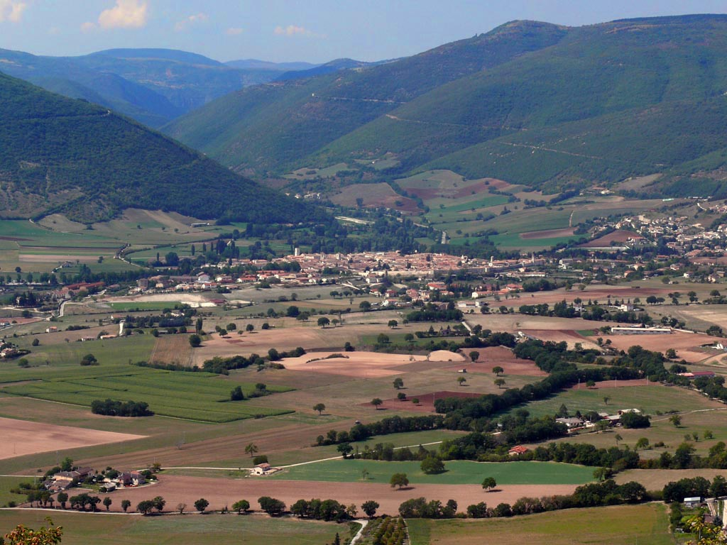 Norcia, general view